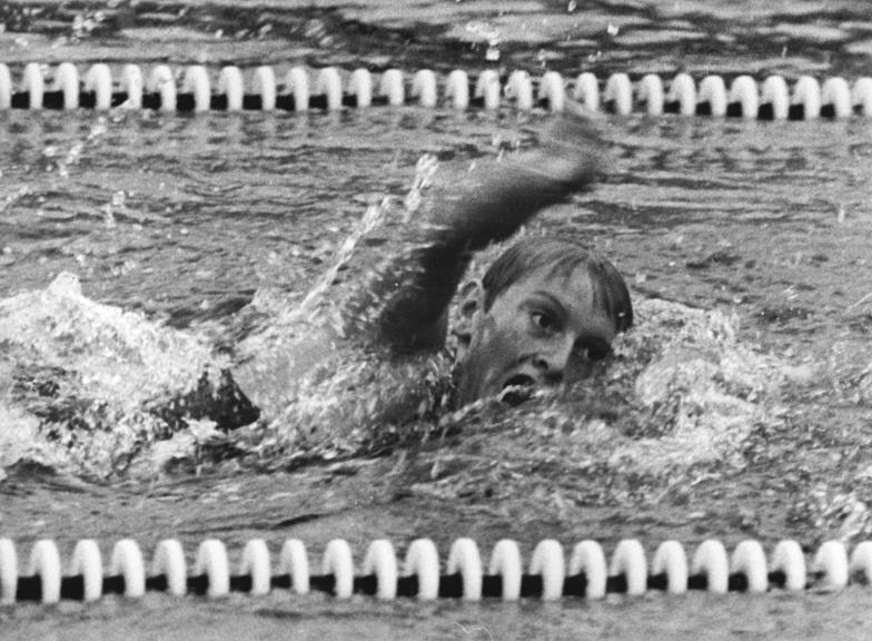 Sigrid Goral Zentralbild Kluge Sche 17.8.1968 Leipzig: Deutsche Meisterschaften der DDR im Sportschwimmen-Europarekord durch Sigrid Goral Nach mehreren Rekordleistungen im bisherigen Verlauf der Meisterschaften fiel nun auch der erste Europarekord. Am 16.8.68 unterbot die 16jährige Sigrid Goral vom SC Empor Rostock über 8 00 Meter Freistil die alte Höchstleistung der in den USA studierenden und trainierenden Schwedin Elisabeth Morris-Ljung-gran um 1,5 Sekunden auf 9:43,5 Minuten. Schon nach 100 Metern (1:08 Minuten) wendete die Rostockerin als Erste. Dann kraulte sie, gleichmäßig wie ein Uhrwerk, die folgenden 100 Meter jeweils in 1:14 Minuten, um sich am Schluß noch einmal zu steigern. Die Siegerin selbst kommentierte ihren Europarekord, mit dem sie sich um 15,1 Sekunde verbesserte und den DDR-Rekord um 14,5 Sekunden unterbot: "Es war unheimlich schwer, das hohe Anfangstempo durchzuhalten. Nun bin ich glücklich, daß ich es geschafft habe."